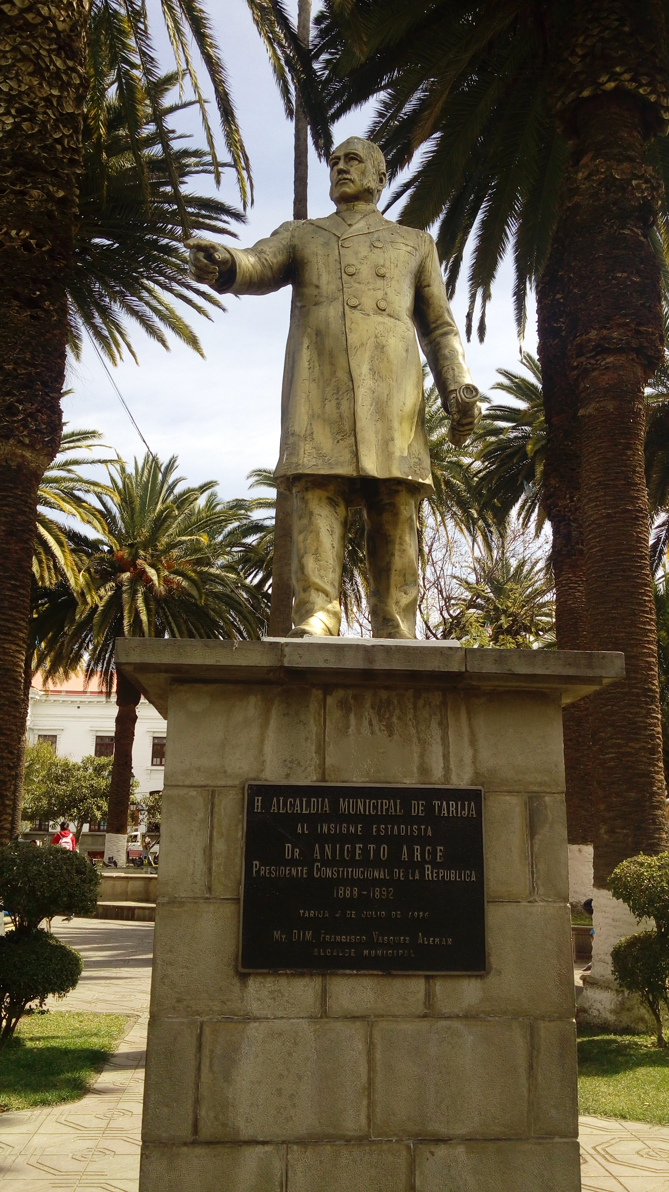 Statue im Gedenken an Aniceto Arce Ruiz de Mendoza in Tarija